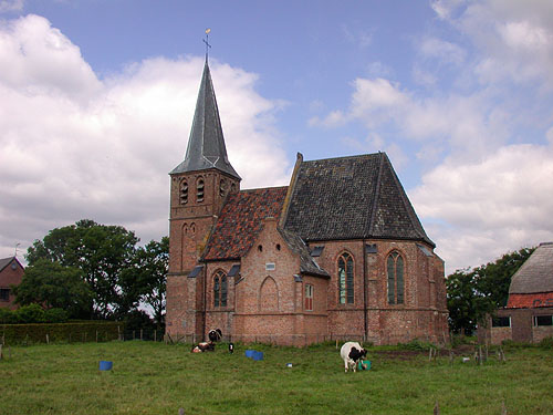 kerk Persingen